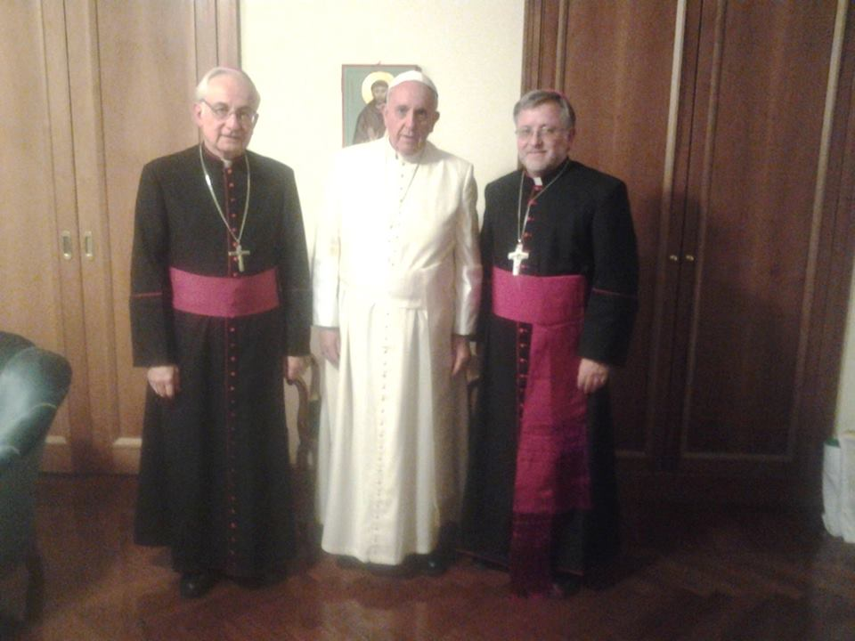 Imagen del Papa con el Arzobispo y el Obispo Auxiliar de Córdoba